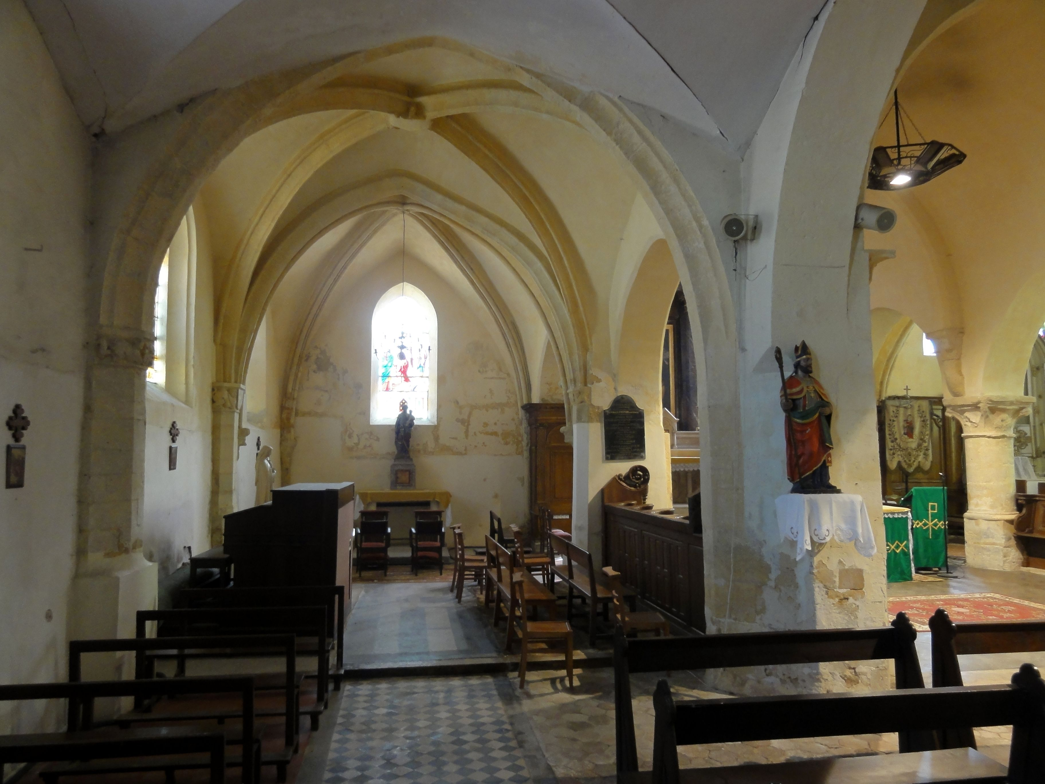 Bas-côté nord, vue vers l'est.